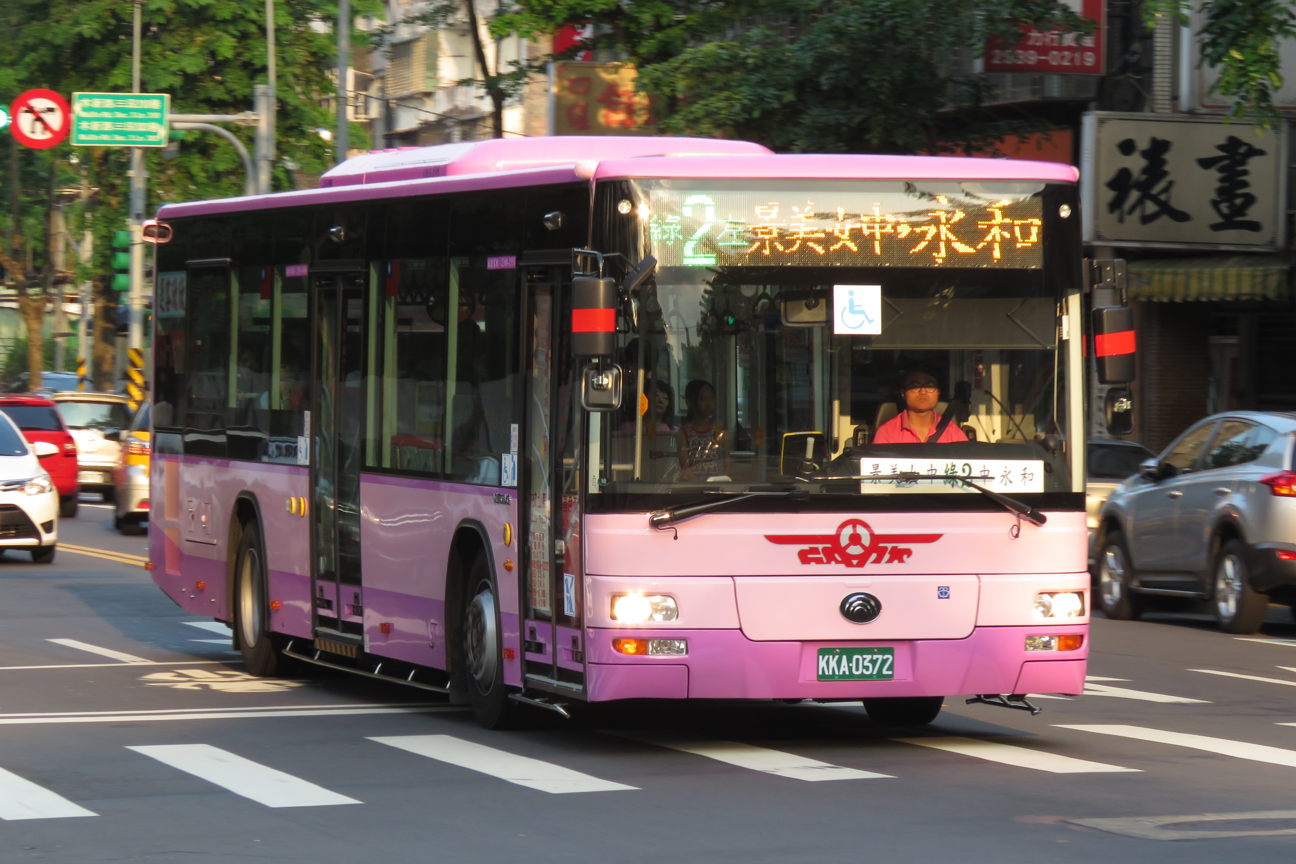 為淘汰2009年HINO大車，欣欣客運在2017年下半年度購入新一批宇通低底盤大車（共19輛），此批包含運用在綠2路線上。